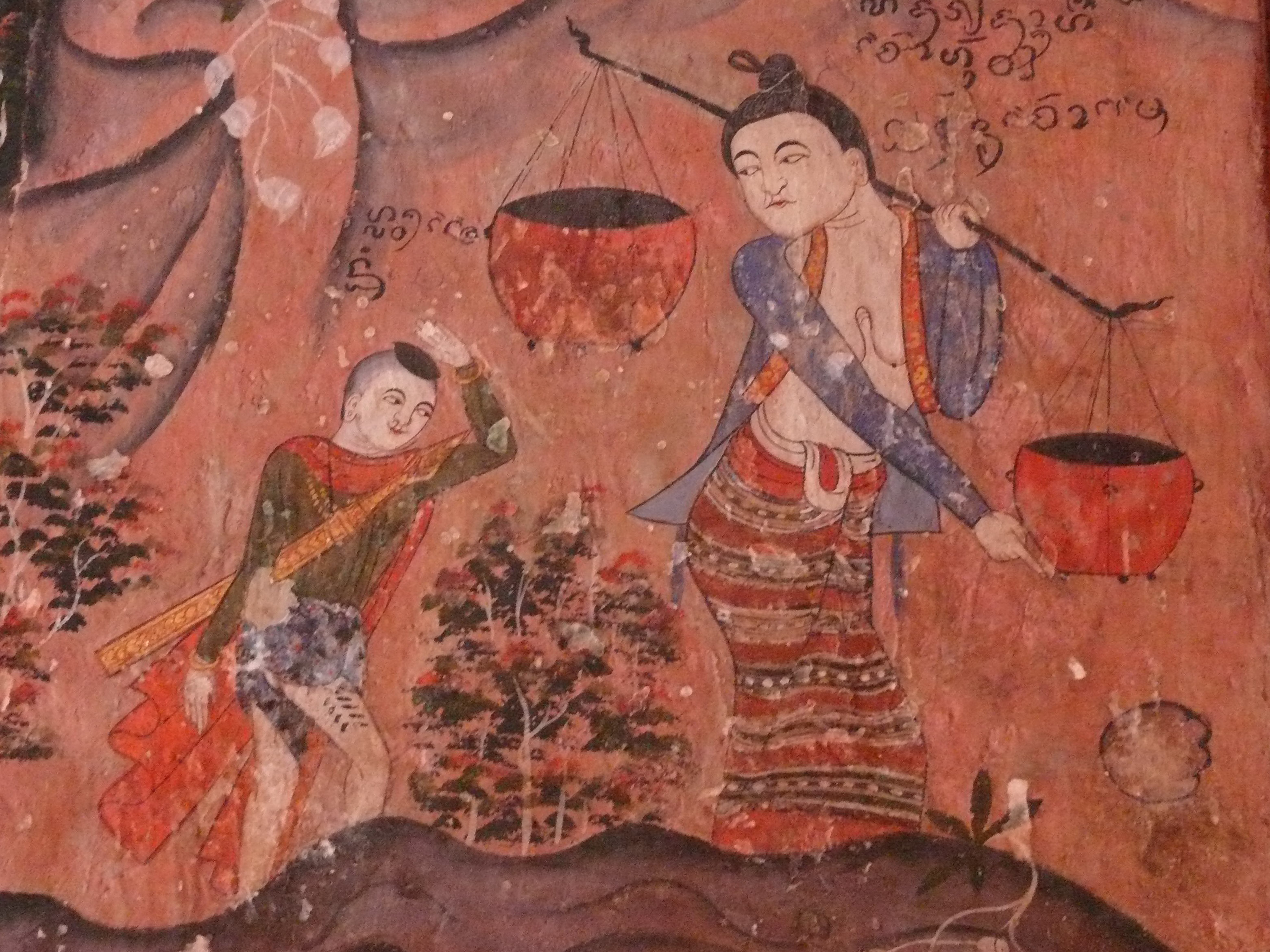 Peinture_murale_Wat_Phumin2,_Nan.JPG